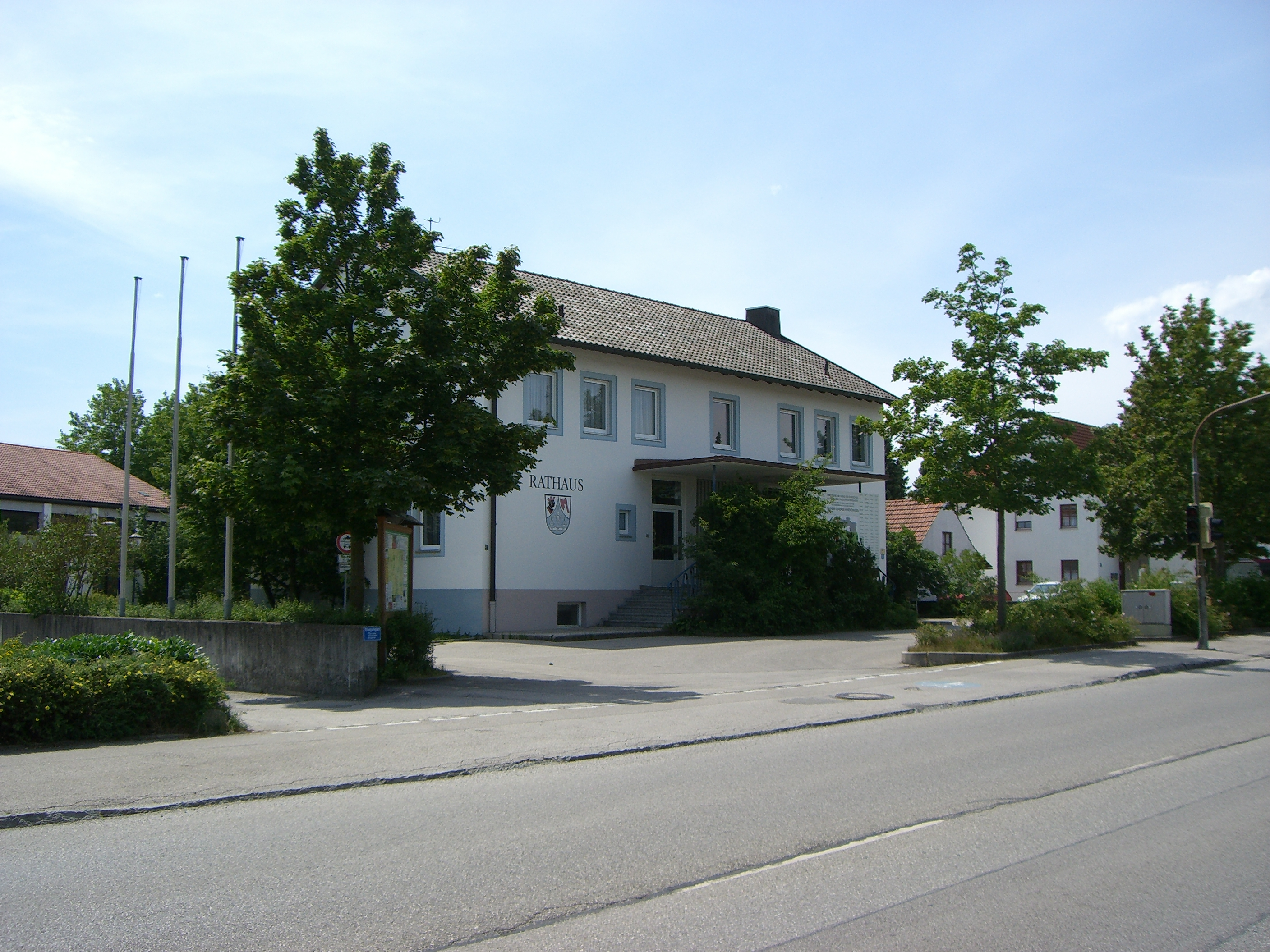 Rathaus der Gemeinde Fahrenzhausen